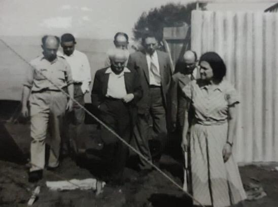 מנדלבליט (שני מימין) בסיור עם ראשי היישוב, ביניהם דוד בן גוריון (מרכז) כחלק מיוזמות הבניה שקידם.